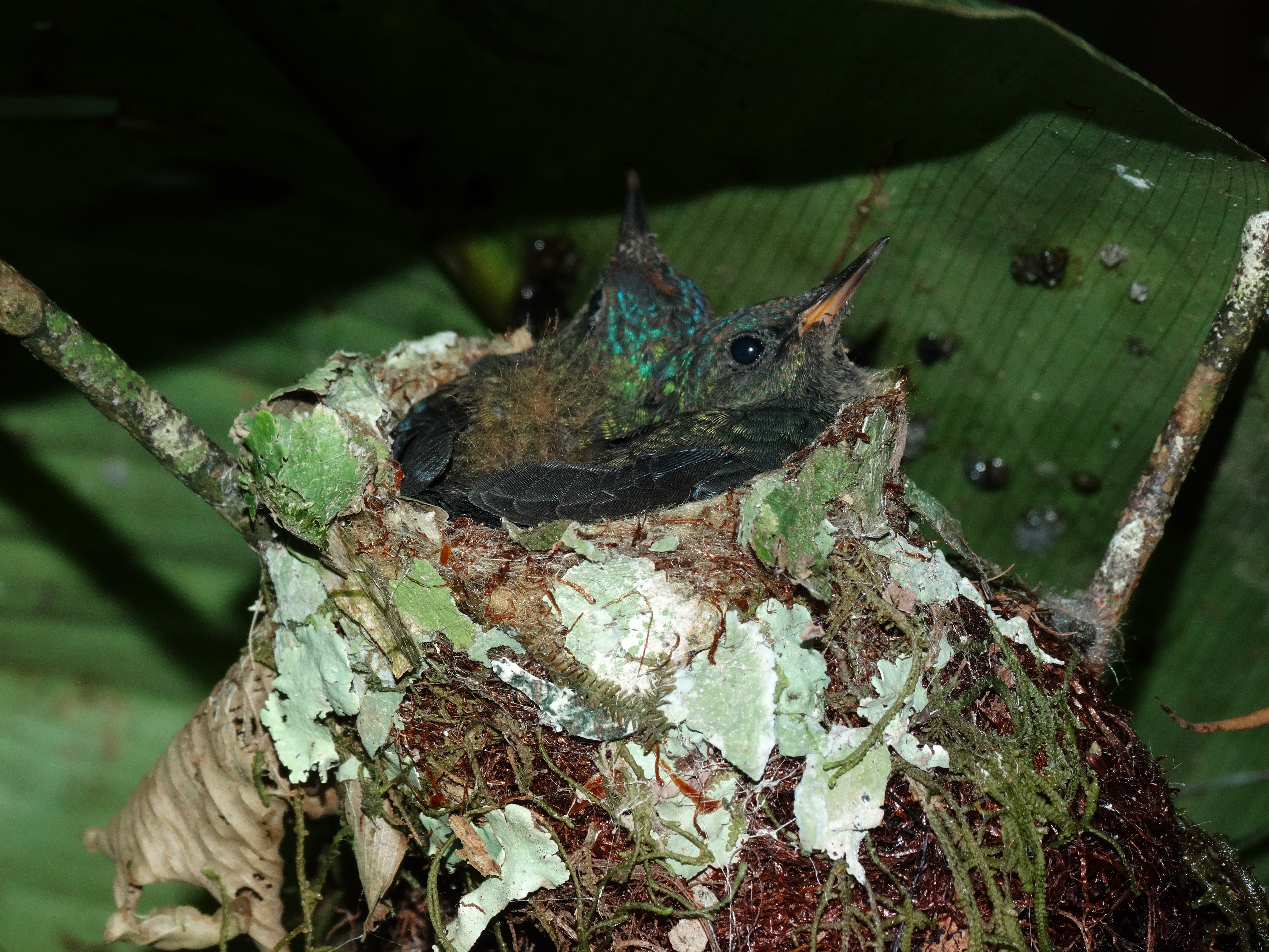 Ninho de beija flor 001